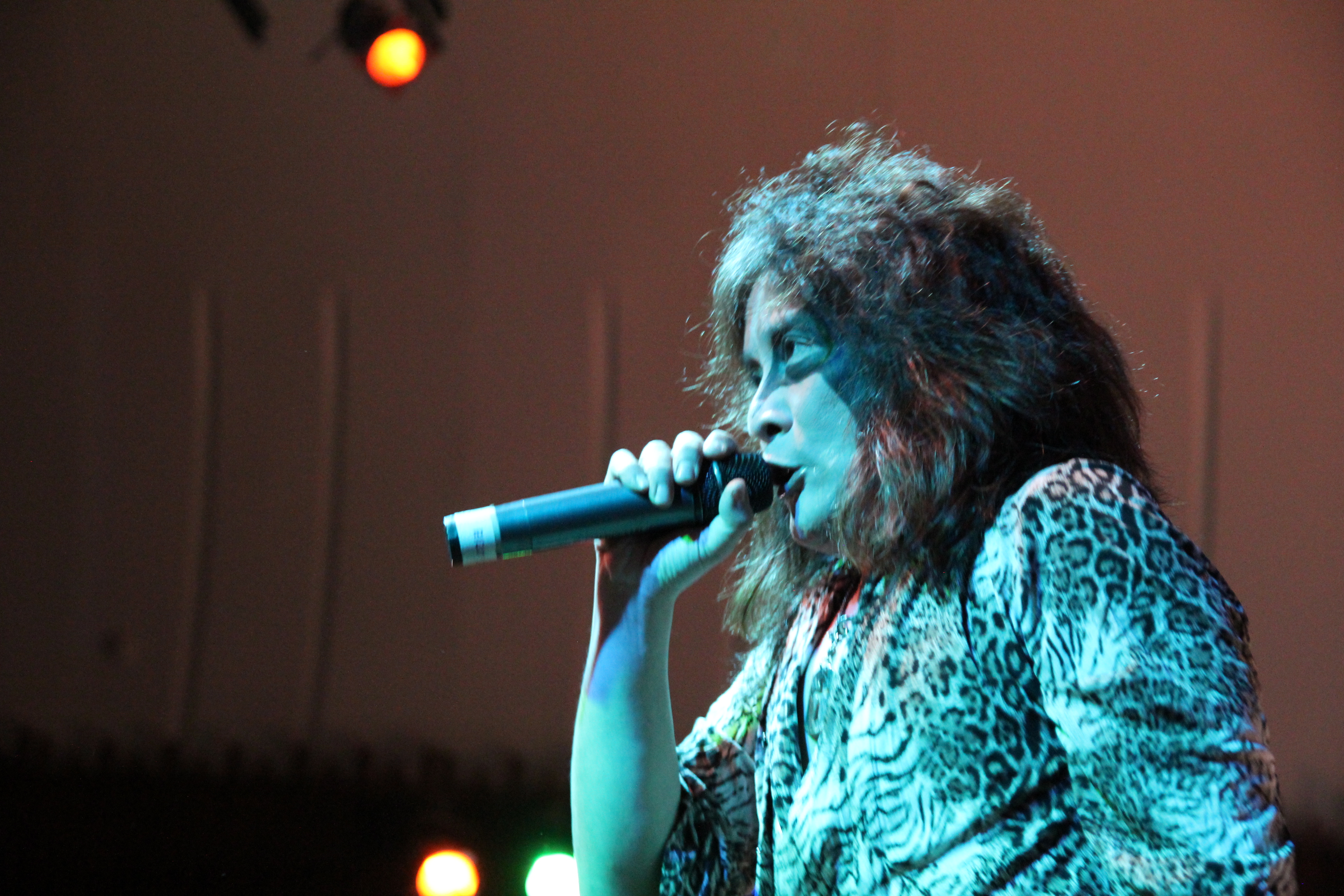 Tokyo Impact! Festival foto 1